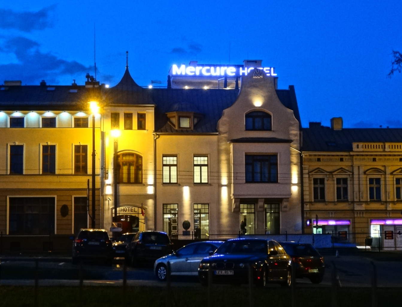 Hotel Sepia (****) w Bydgoszczy przy ul. marszałka Focha